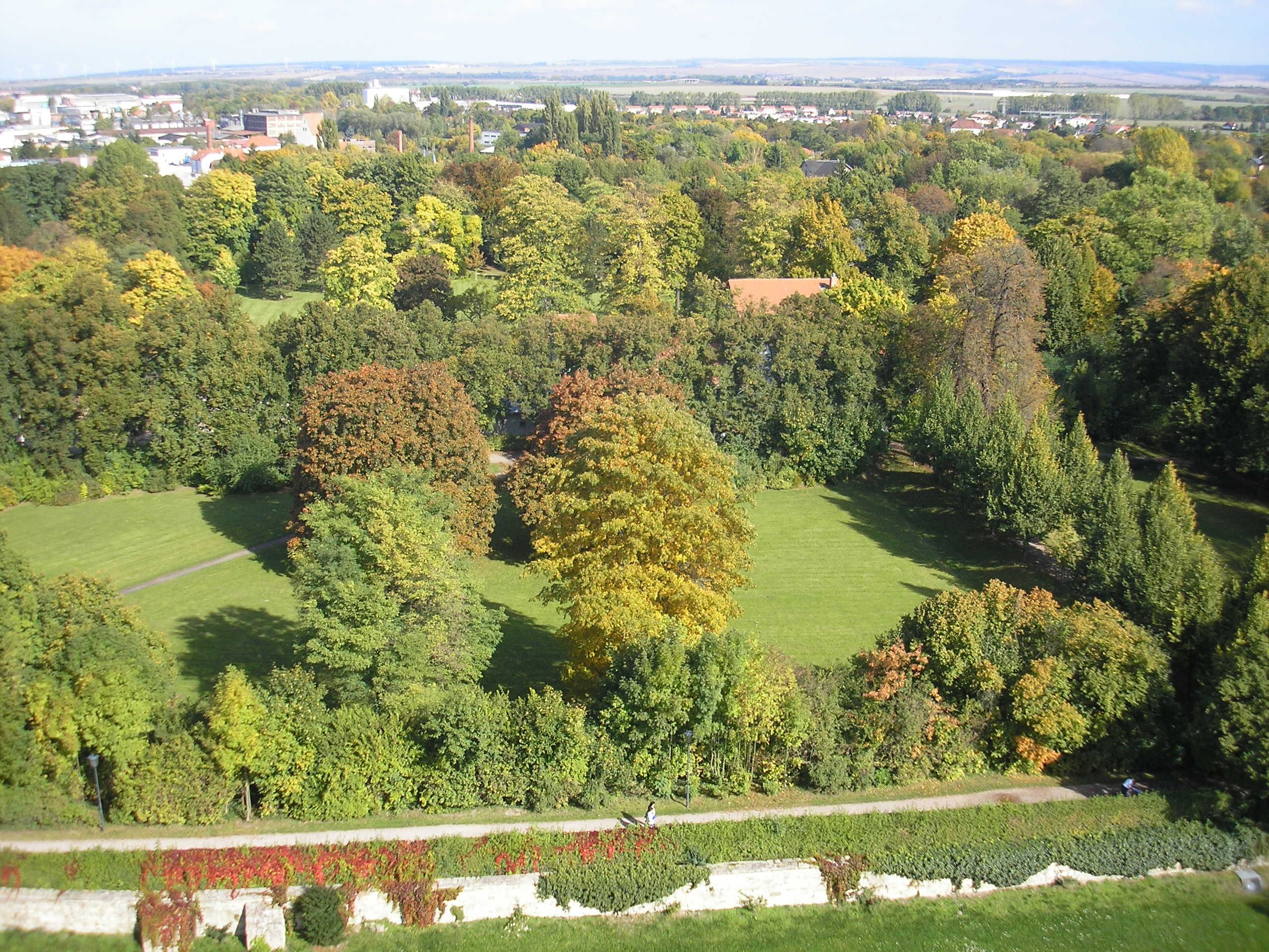 Blick über den Schlossgarten in Arnstadt (Thüringen).